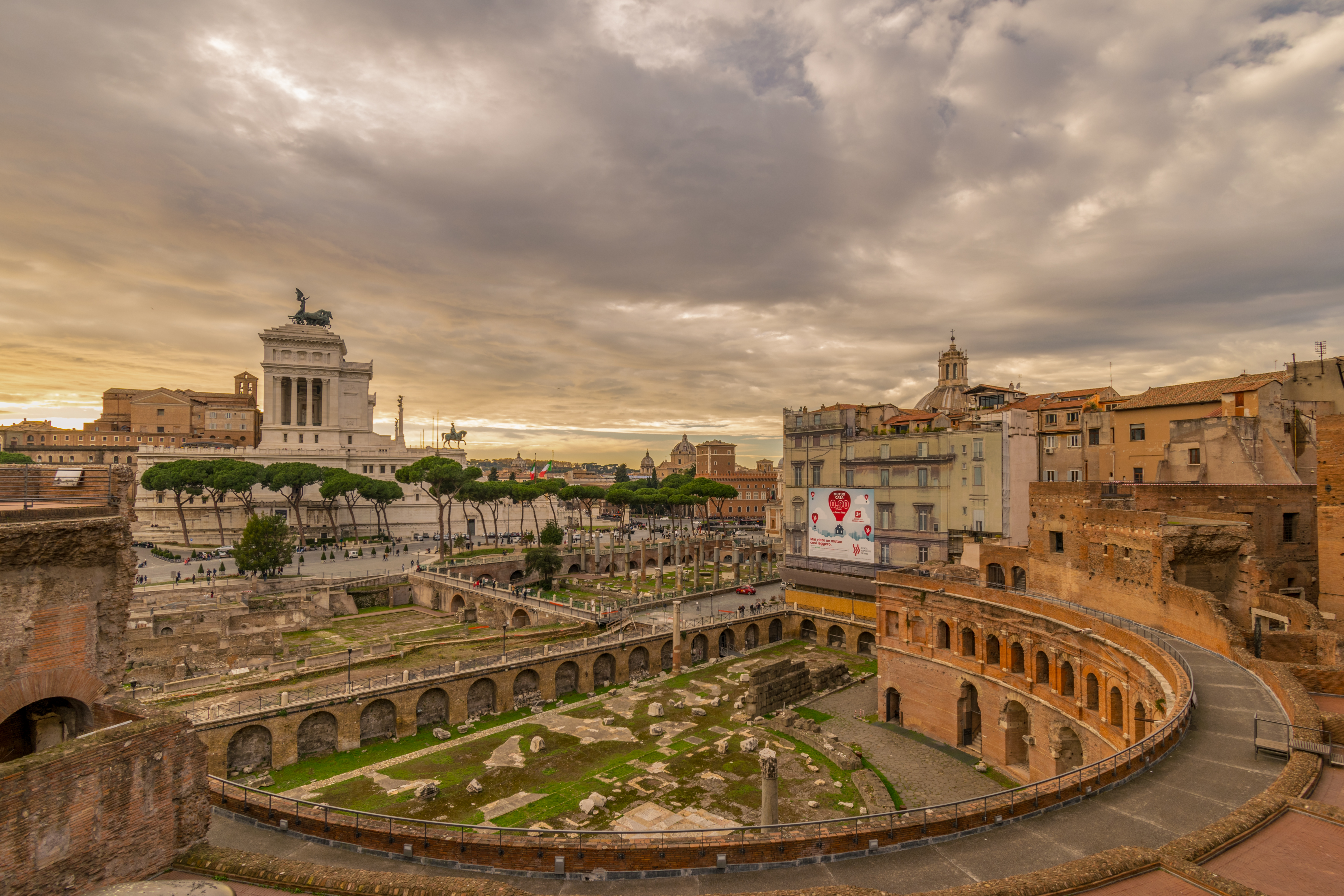 Blick über die Trajansmärkte und das Trajansforum in Rom